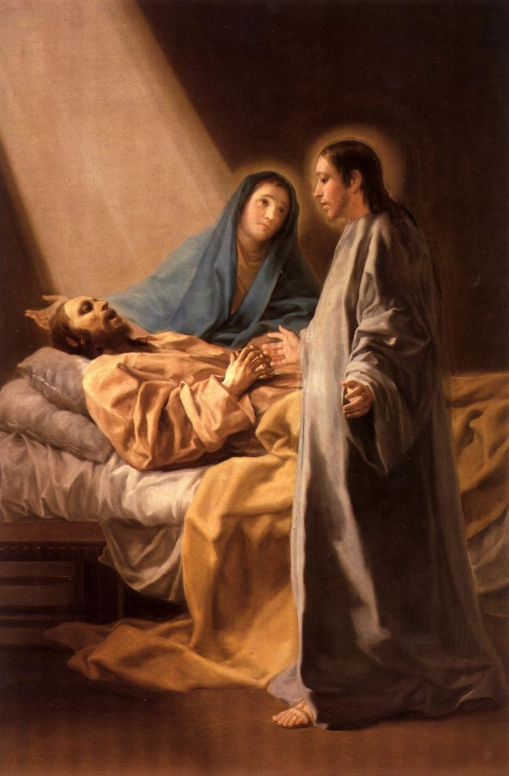 La obra representa el tránsito o la muerte de San José, el padre de Jesucristo.